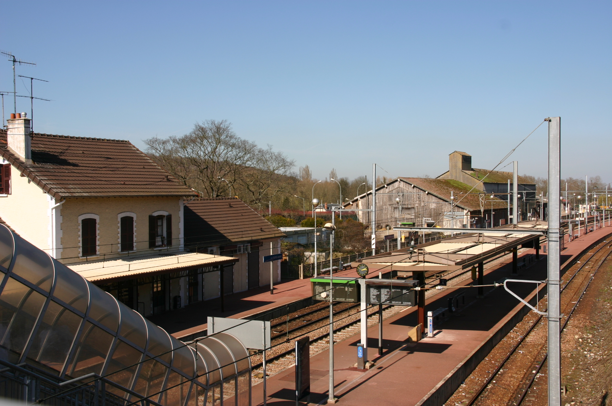 La gare de La Ferté-Alais, La Ferté-Alais, département de l'Essonne (France)